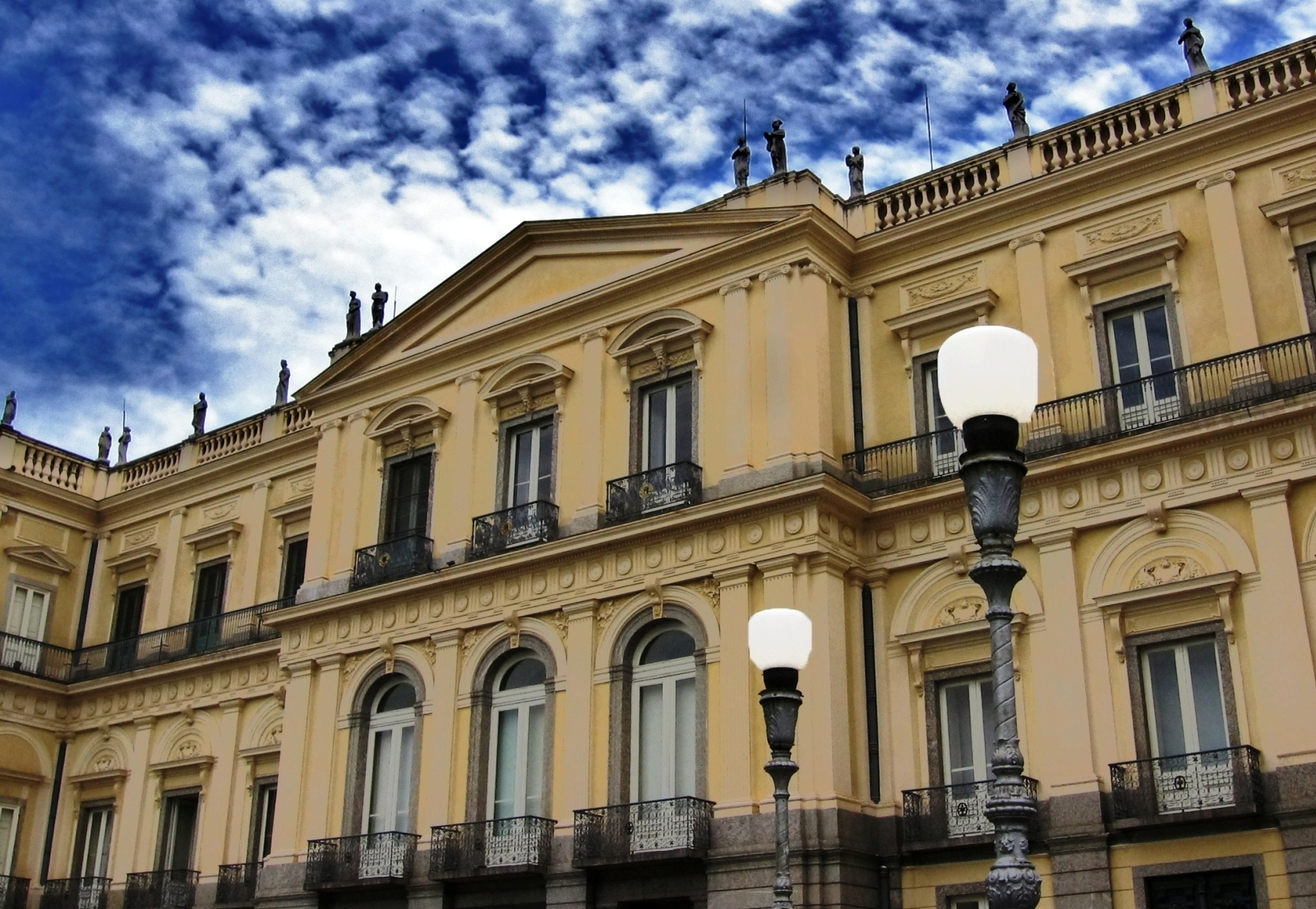 Foto da fachada do Museu Nacional da UFRJ, no Rio de Janeiro, Brasil.